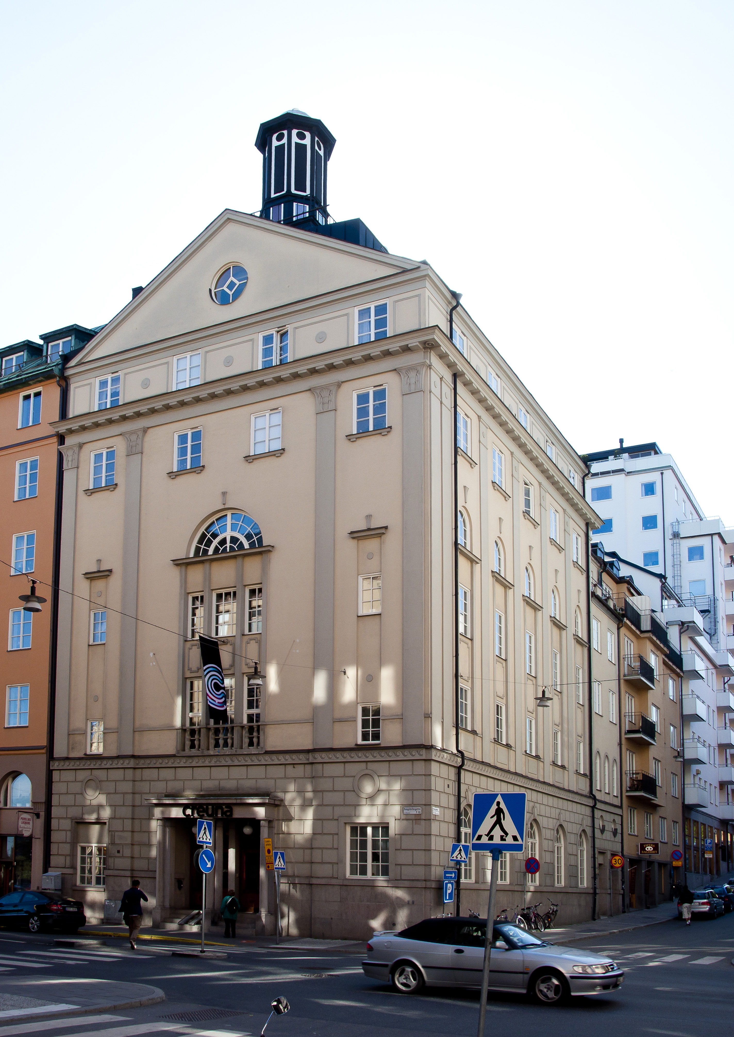 Diamanten 11, Kungsholmsgatan 23, Pipersgatan 22. Byggnadsår 1927-28, arkitekter Höög & Morssing, byggherre Lutherska Missionsförbundet - Wilhelm Norrlander, byggmästare. "Ansgariikyrkan" A Olsson